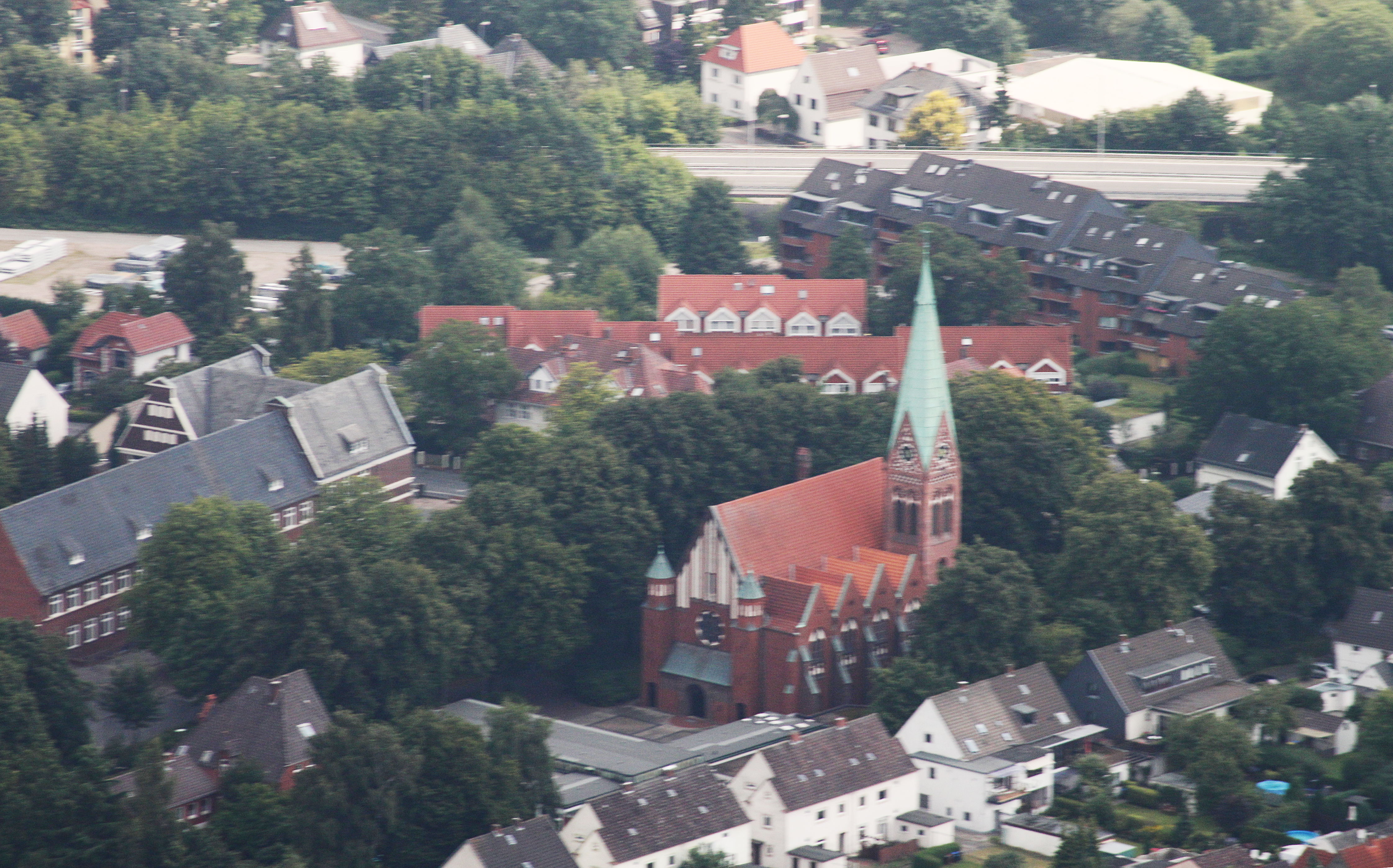 Martin-Luther-Kirche (Blumenthal); Bremen Nord; Fotoflug Bremen; Flughöhe 500 m; Luftbilder Bremen-Nord: vom U-Boot Bunker Valentin bis Vegesack ; Flug entlang der Weser von West nach Ost, über dem linken Weserufer, mit Blickrichtung zum rechten Weserufer